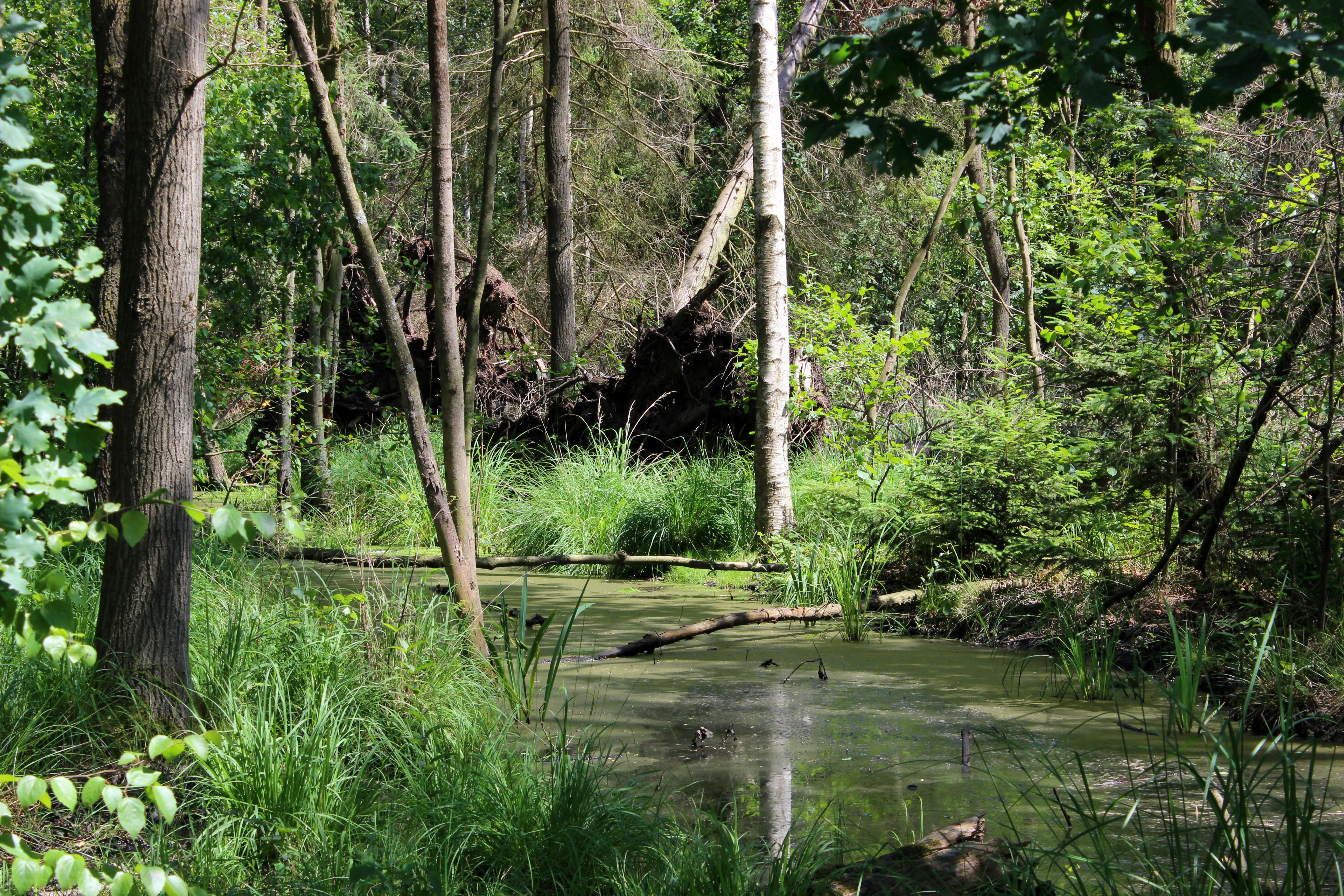 Naturschutzgebiet Giebelmoor: Trotz der Entwässerungsgräben gibt es im Moor vernässte Gebiete im Wald. Das Naturschutzgebiet ist ein Teil des FFH-Gebietes Drömling.